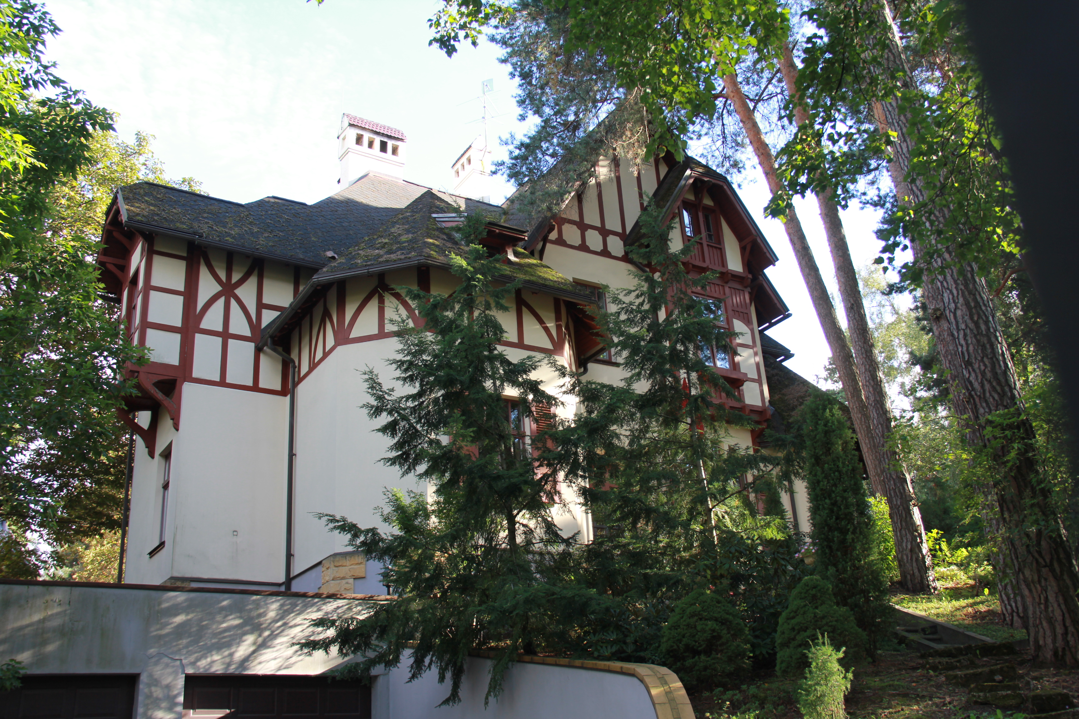 Savrupmāja, Rīga, Hamburgas iela 25